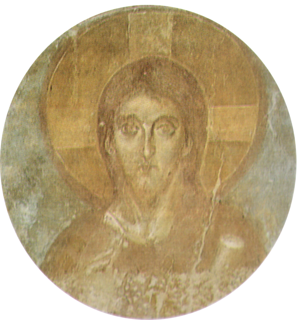 Maestro di castelseprio, cristo benedicente